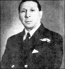 Giorgos Kalafatis im Gründungsjahr von Panathinaikos (1908)